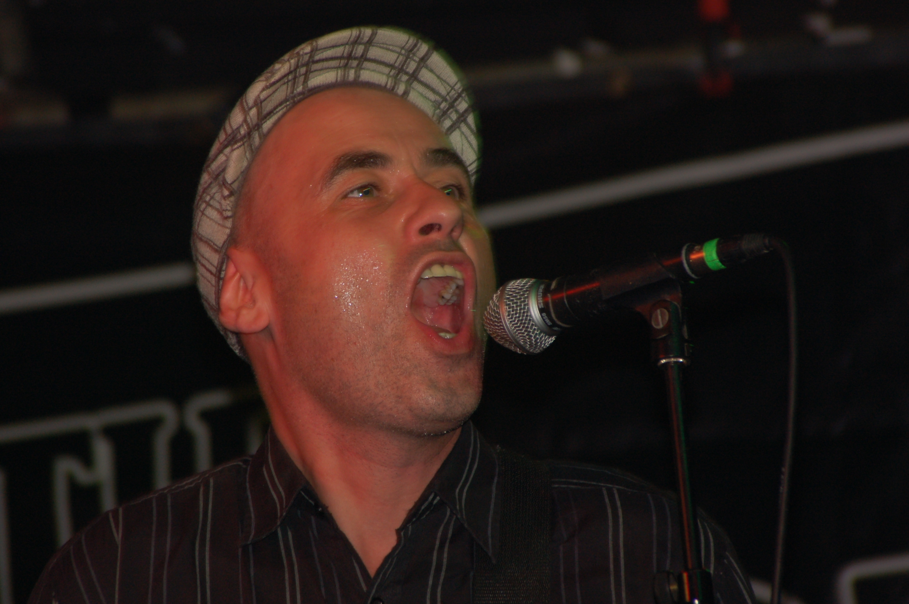 Johnny Bottrop von der Gruppe „The Bottrops“ bei einem Konzert in der Arena, Wien